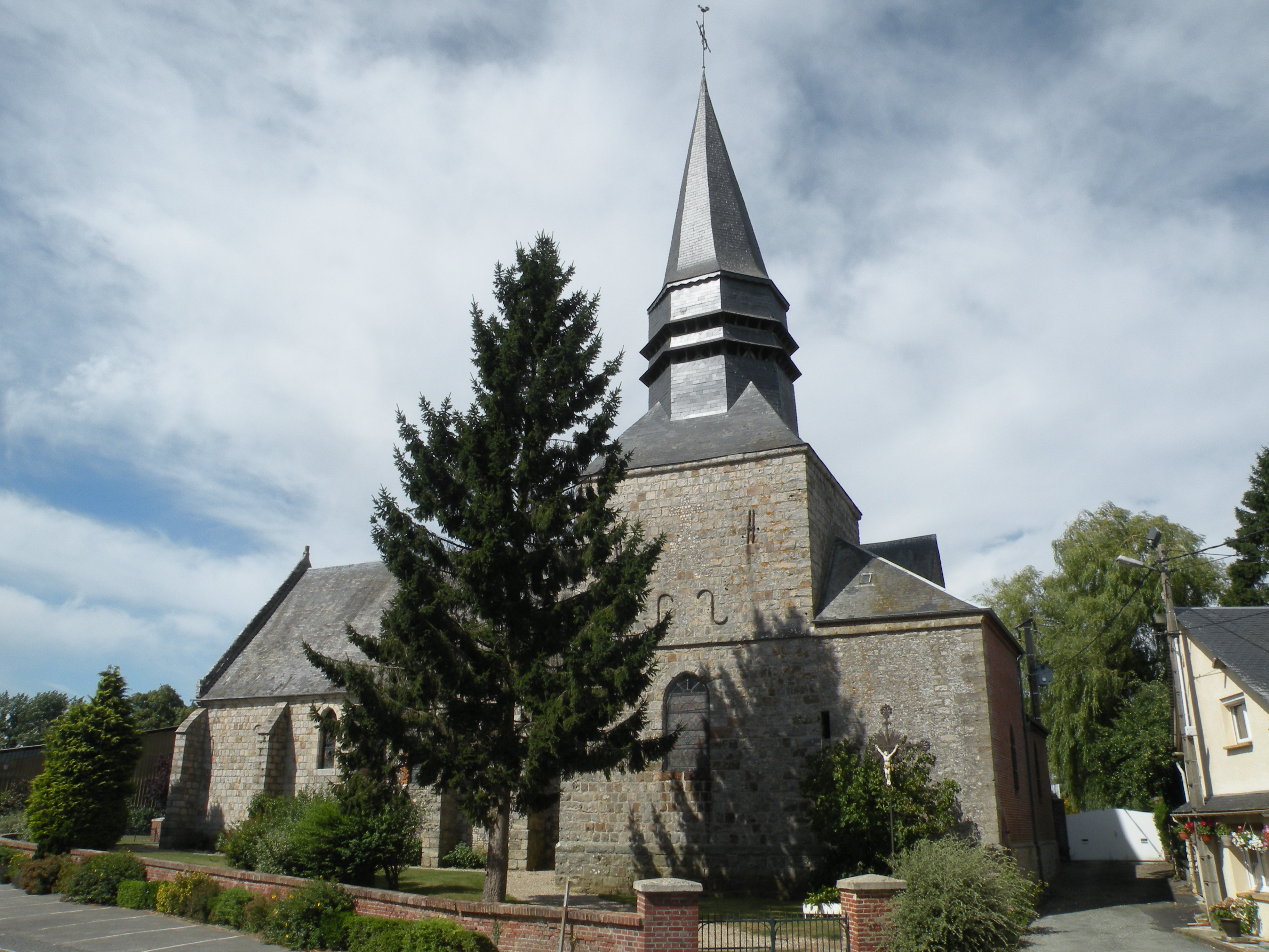 Grémévillers église